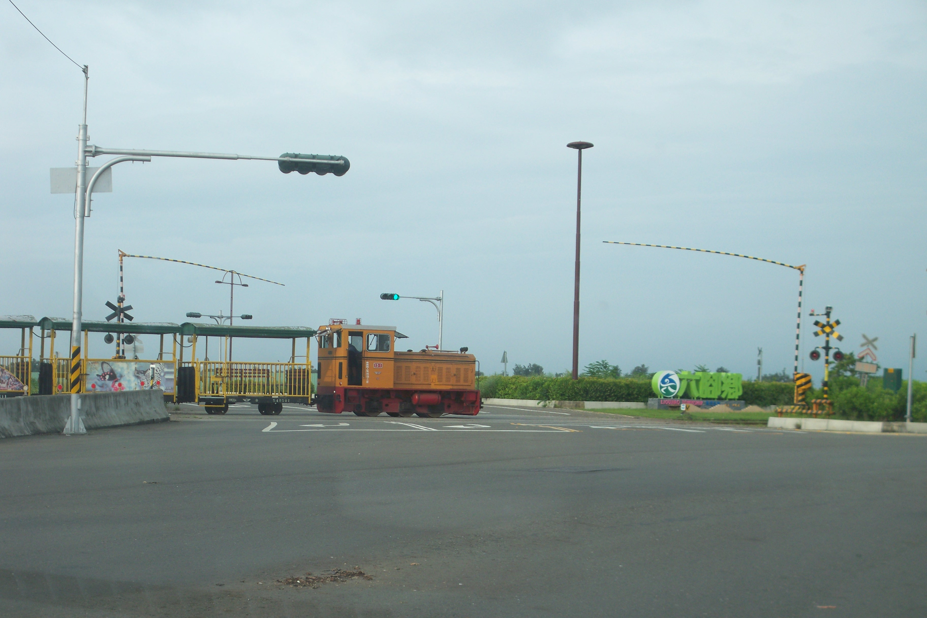 嘉義縣太保市 蒜頭糖廠平交道